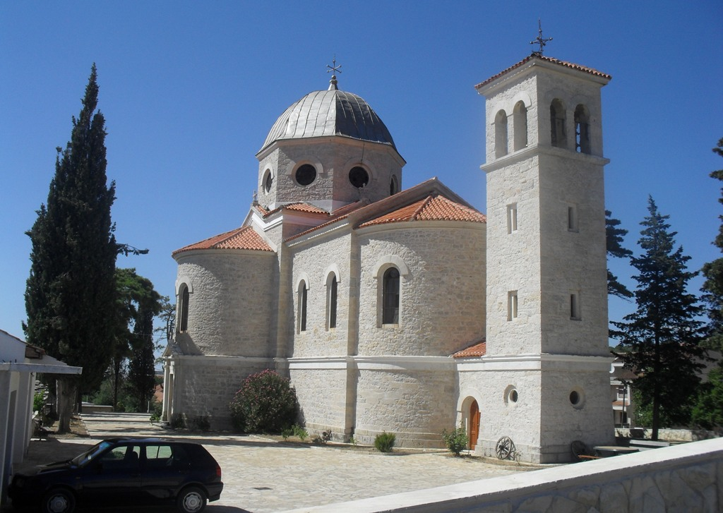 Pravoslavna crkva Rođenja Svetog Ivana Krstitelja u Benkovcu.